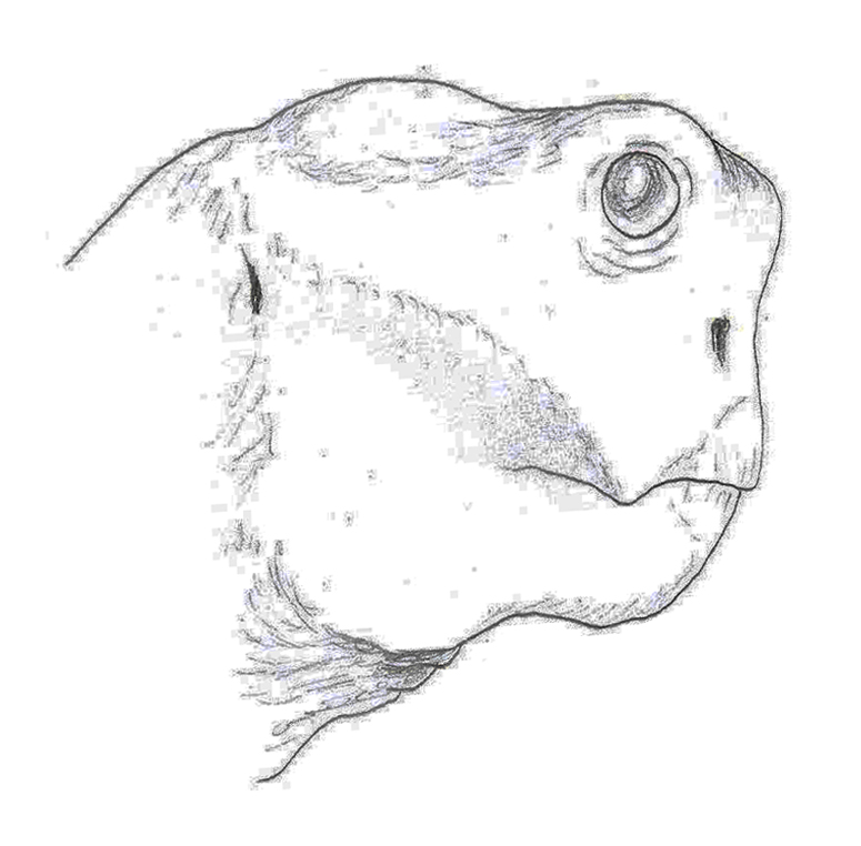 Reconstruction of Geikia, on the basis of: Rowe, T. (1980). "The morphology, affinities, and age of the dicynodont reptile Geikia elginensis". In Jacobs, L.L. (ed.). Aspects of Vertebrate History. Museum of Northern Arizona Press. pp. 269–294.